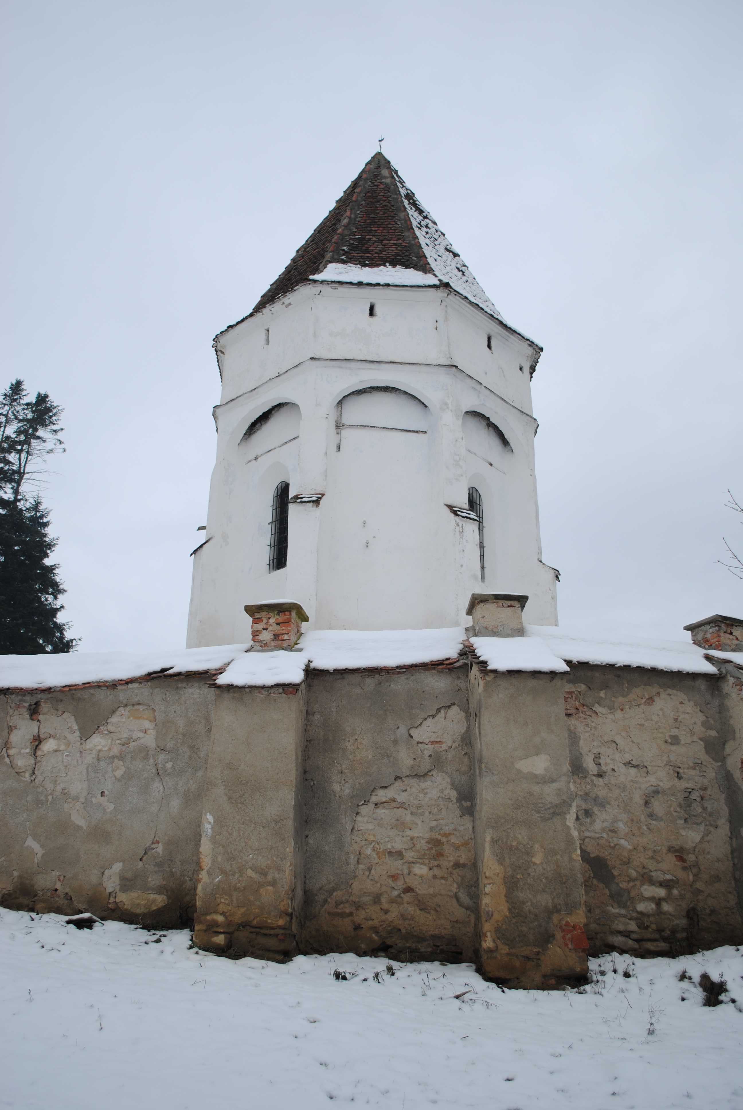 Ansamblul bisericii evanghelice fortificate, sec. XIII-XVI